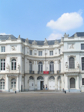 Façade d'entrée du Palais de Charles de Lorraine à Bruxelles